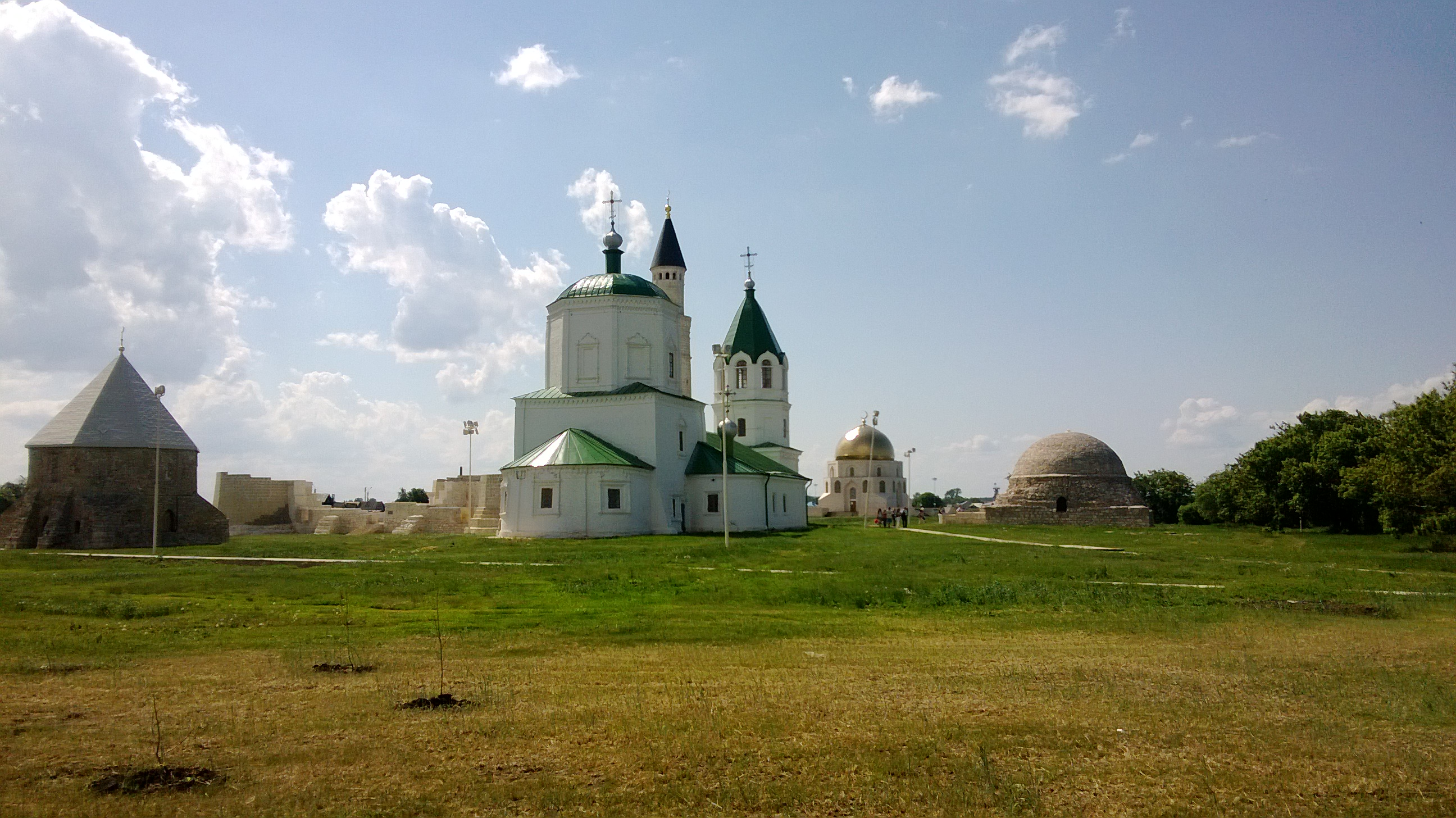 Почти все достопримечательности Болгар на одном кадре (Восточный мавзолей XIV в. Соборная мечеть XIII век. Большой минарет (реконструкция). Церковь Успенья XVIII в. Памятный знак XXI в. Северный мавзолей XIV в.). Болгар. Татария. Июнь 2013